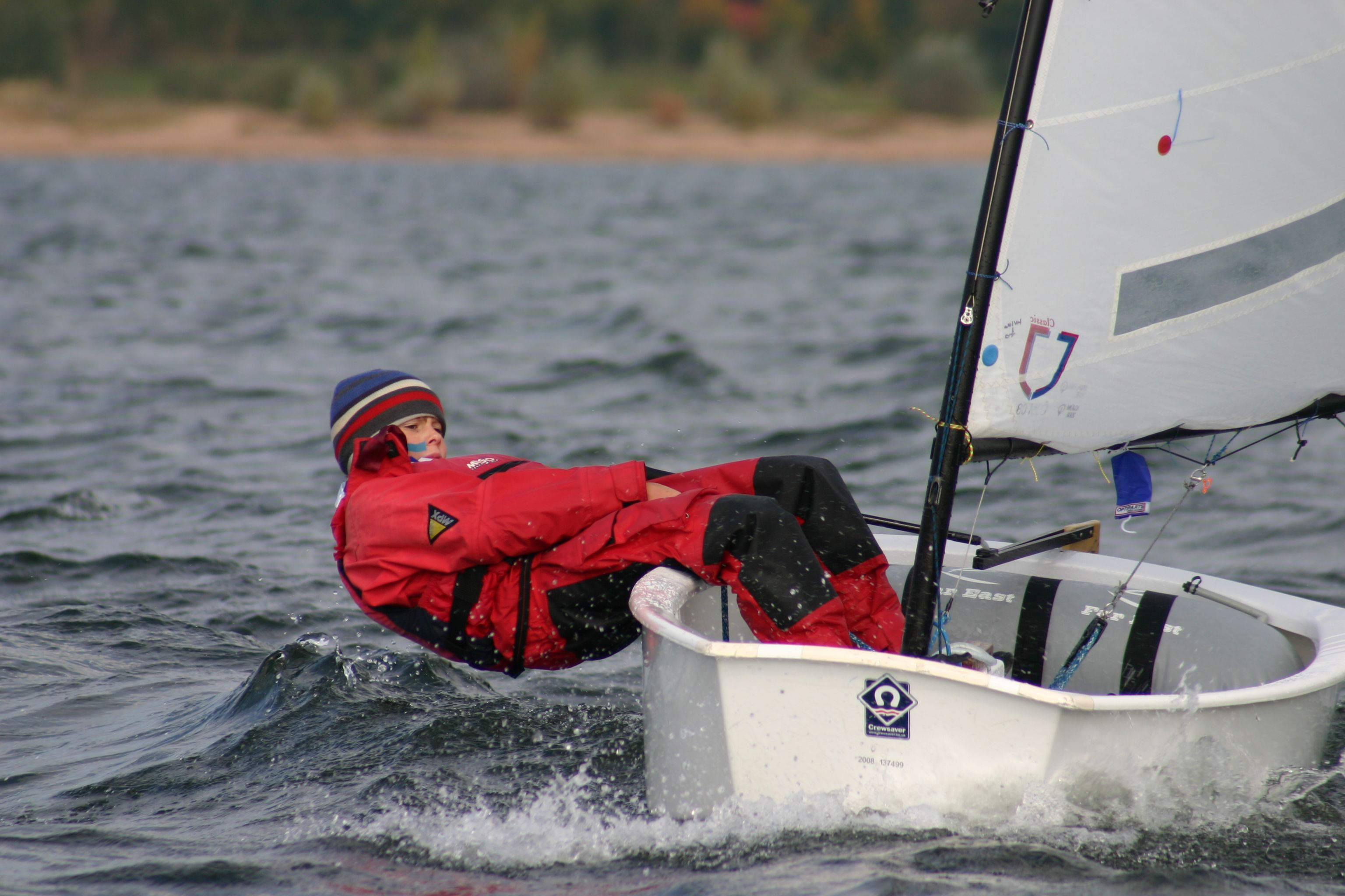 Severin Rothlauf segelt Optimist